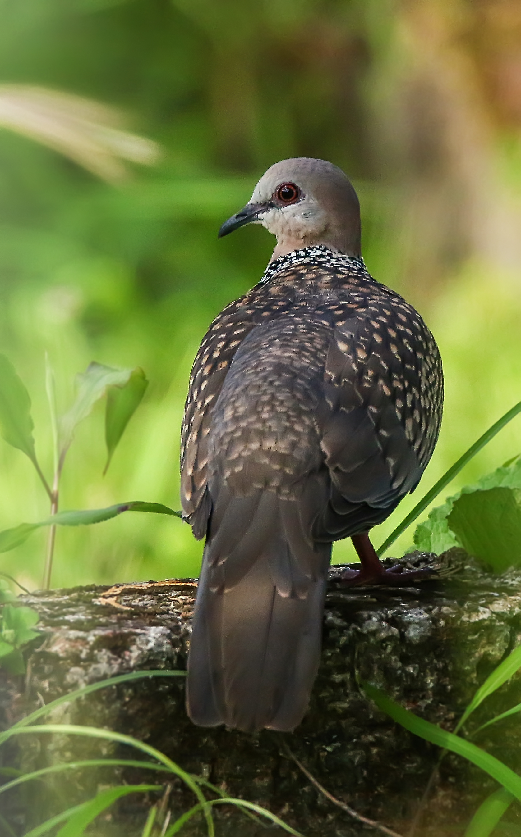 തൃശ്ശൂരില്‍ നിന്നും പകര്‍ത്തിയ ചിത്രം